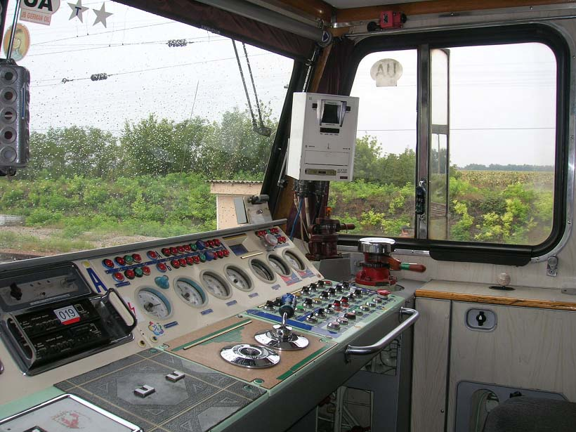 Место машиниста электровоза ДЭ1